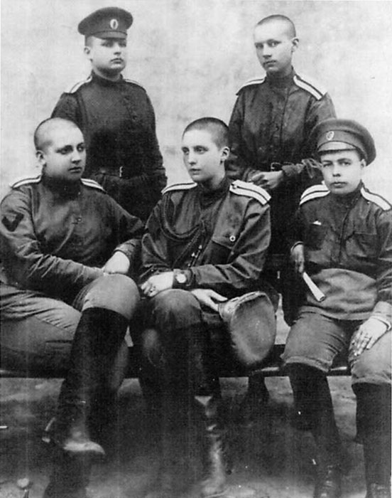 Женский батальон смерти. Июнь 1917 – ноябрь 1918. Руководящий состав воинского формирования. Фото. Лето 1917. На фото М. Бочкарева сидит крайняя слева.